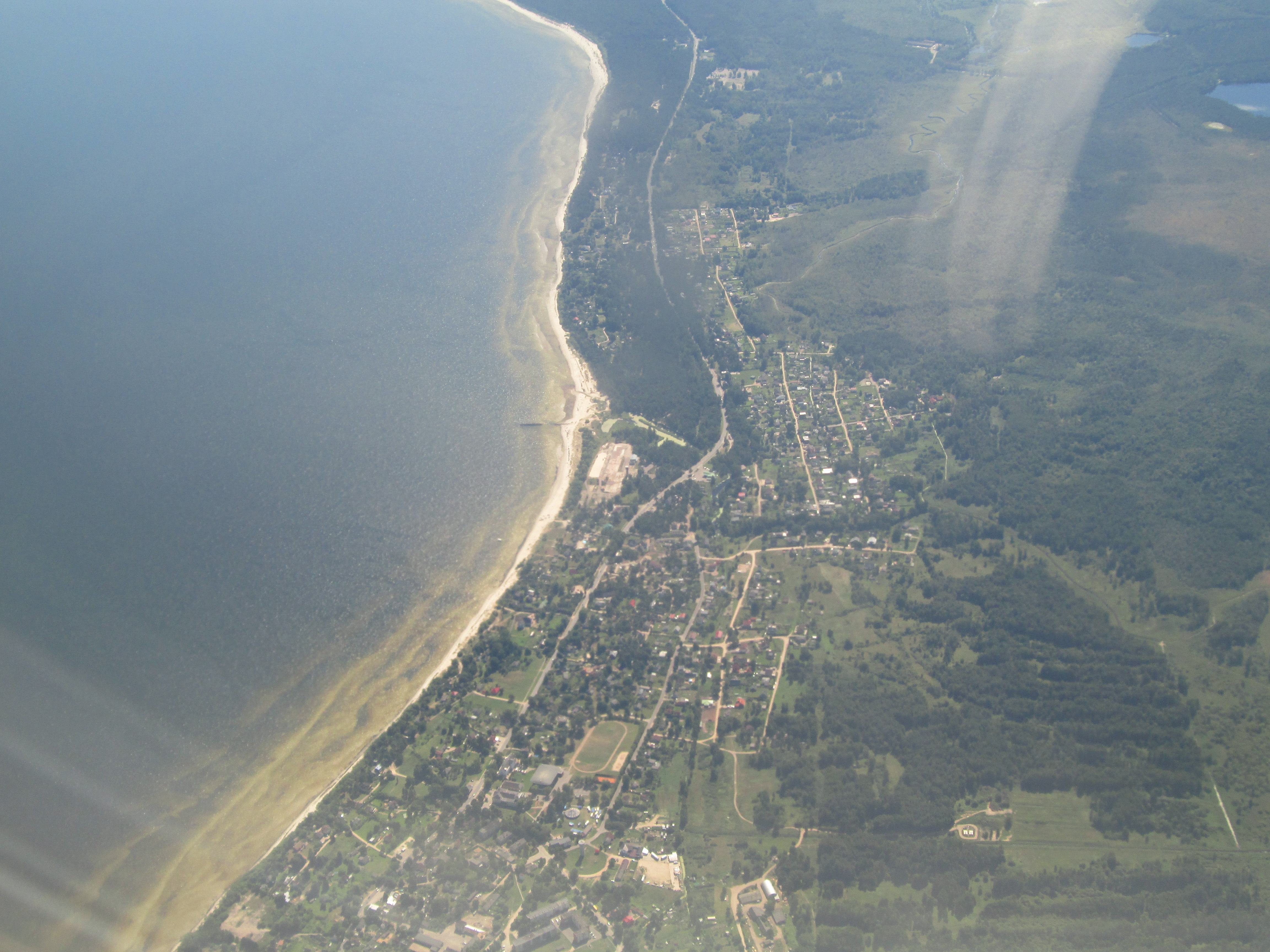 P128, Lapmežciems, Lapmežciems Parish, LV-3118, Latvia